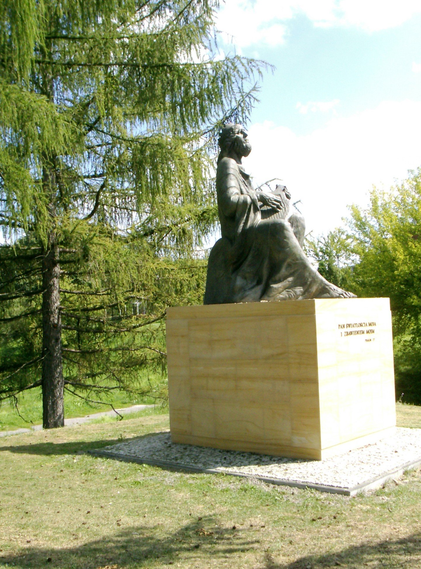 Dawid Psalmista w Zamościu przy nowej Bramie Lubelskiej. Autor: prof. Gustaw Zemła